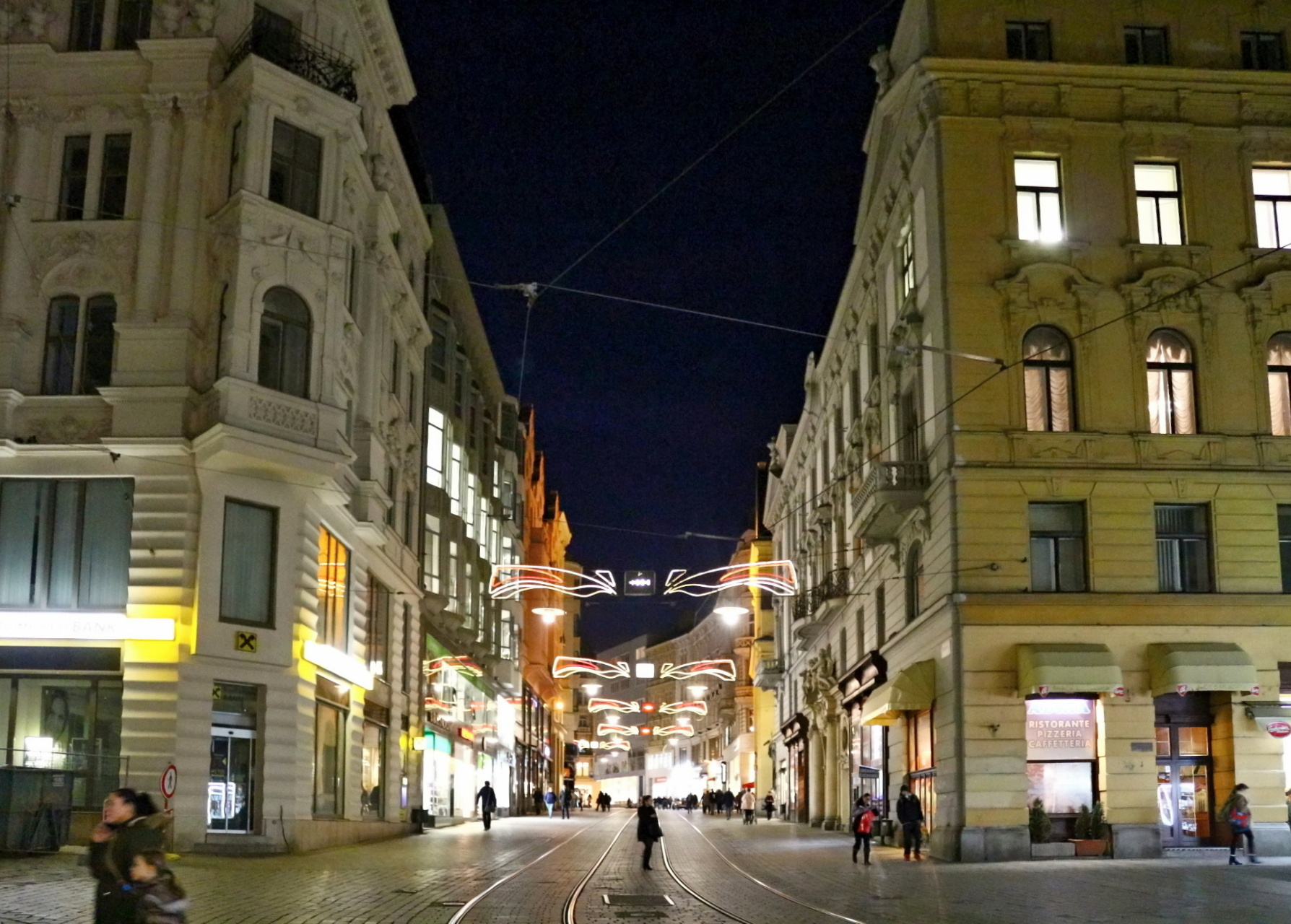 Brno Masarykova ulice